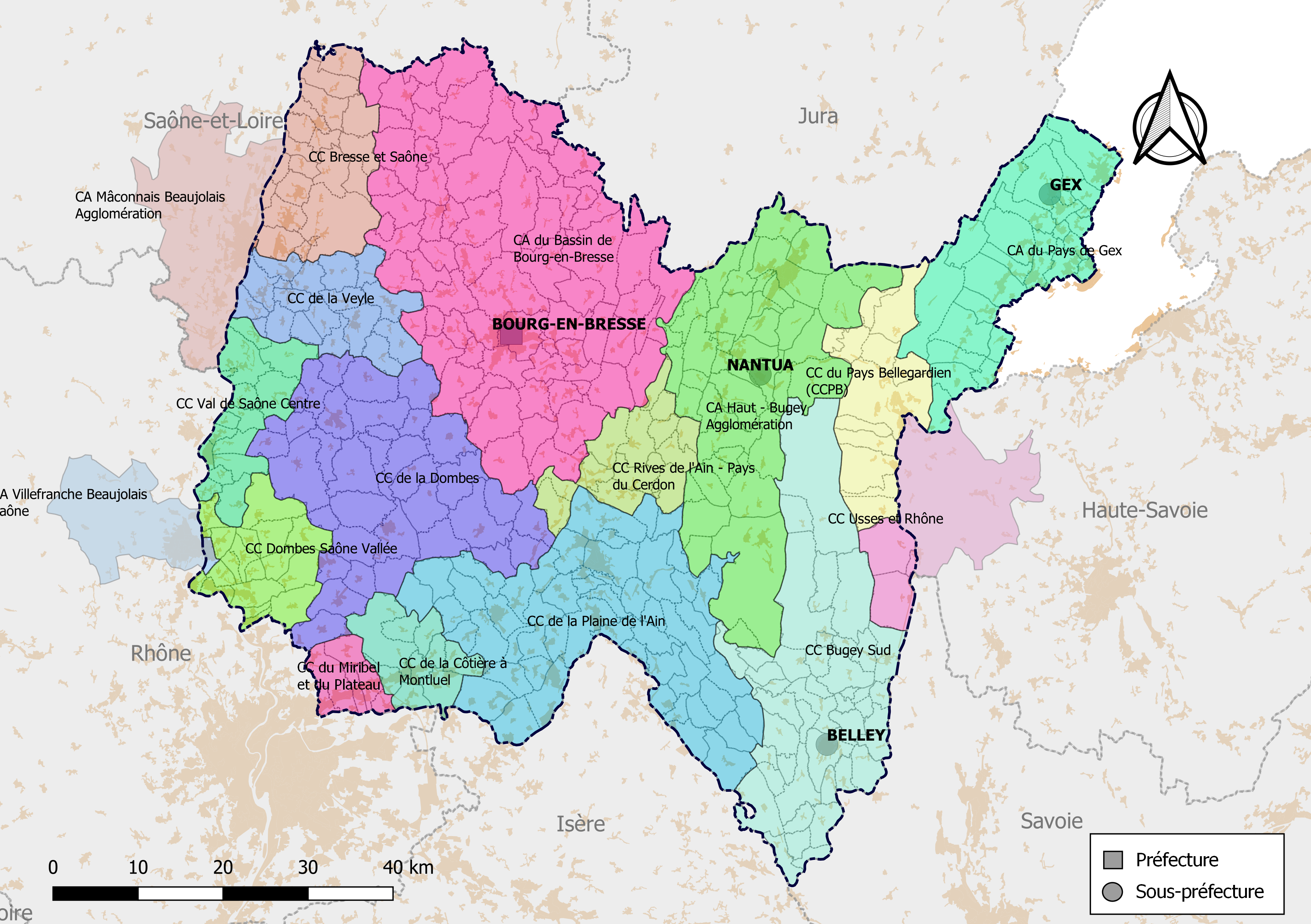 Carte des intercommunalités du département de l'Ain, France. Composition au 1er janvier 2019